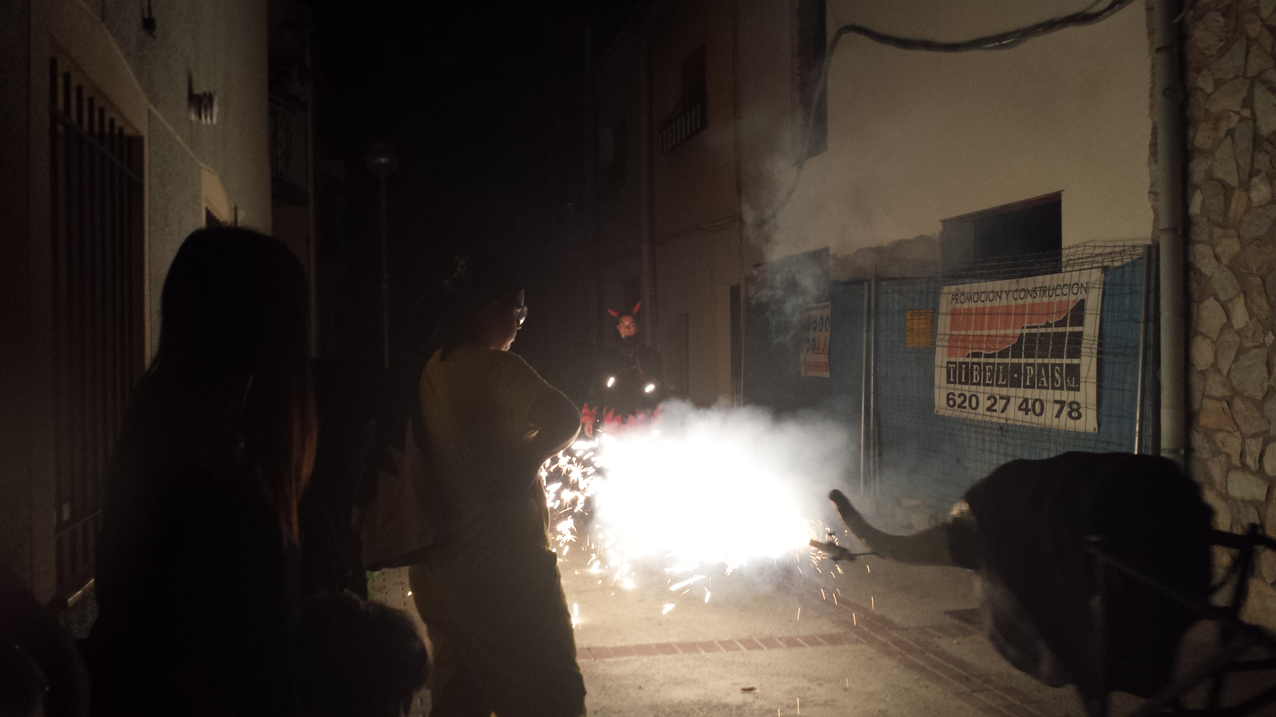 Foto realizada durante la actividad llamada "Correbou de Foc" en Canovelles.